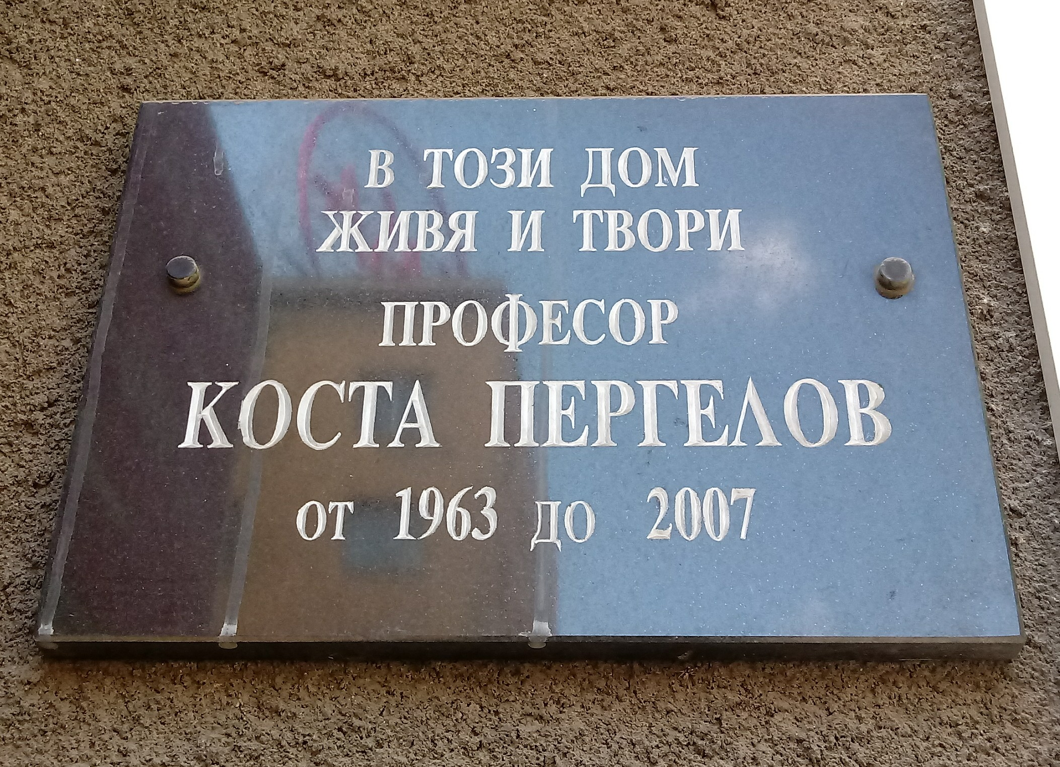 Kosta Pergelov memorial plaque, 49 Vasil Levski Blvd., Sofia